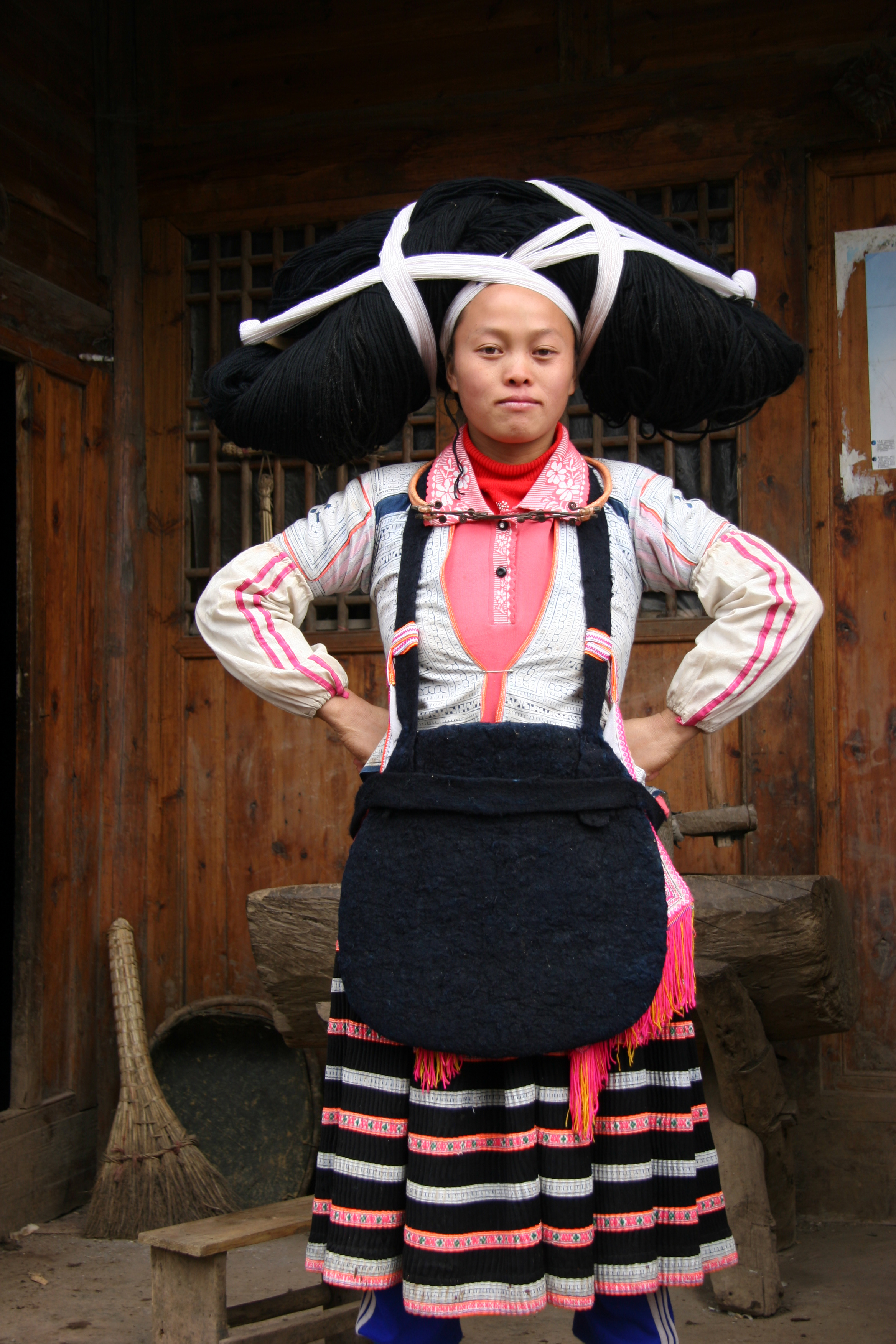 Chine Guizhou Suoga Femme miao à corne